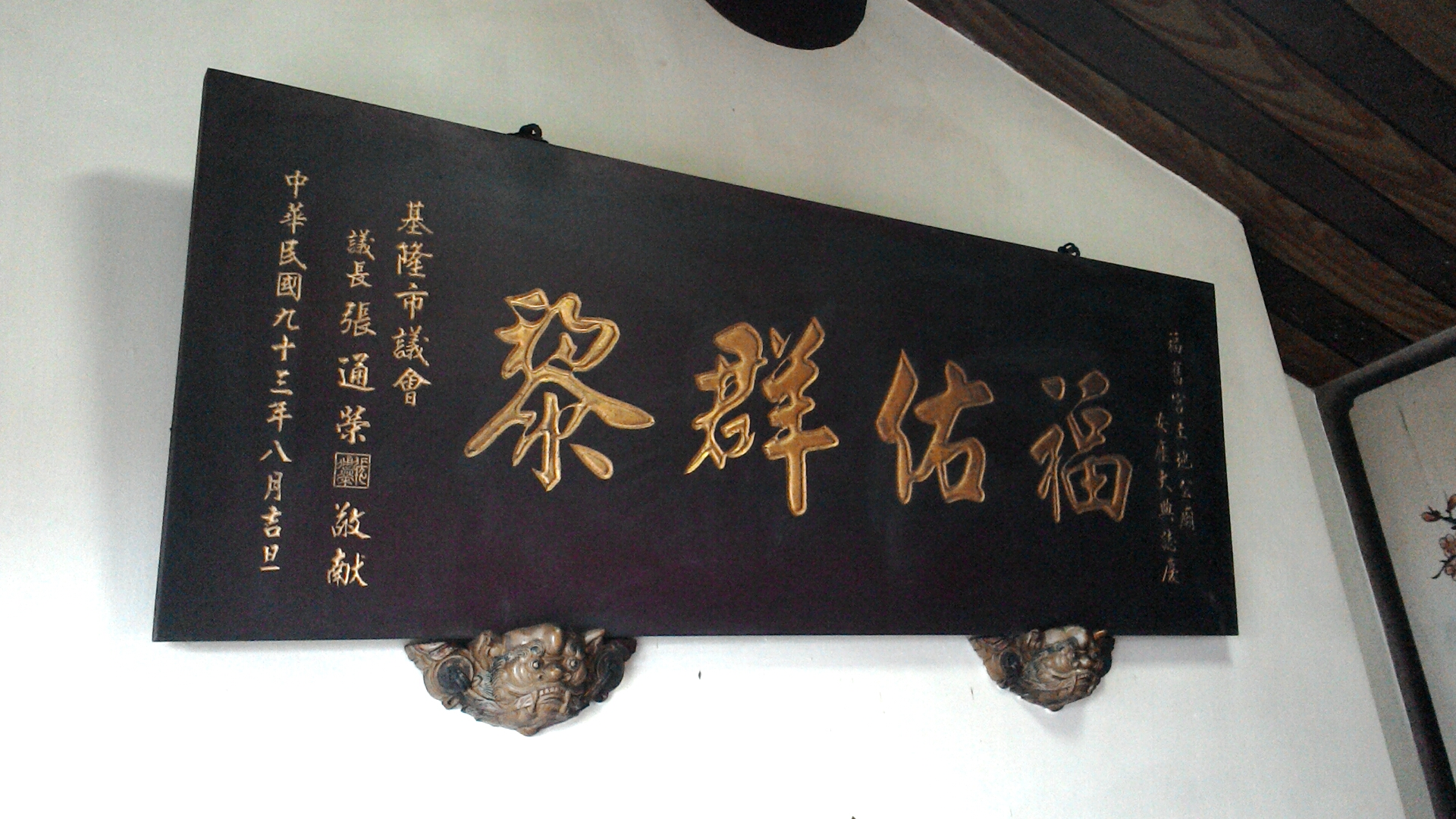 基隆市中正區福舊宮，基隆市議會議長張通榮所贈的「福佑群黎」匾。